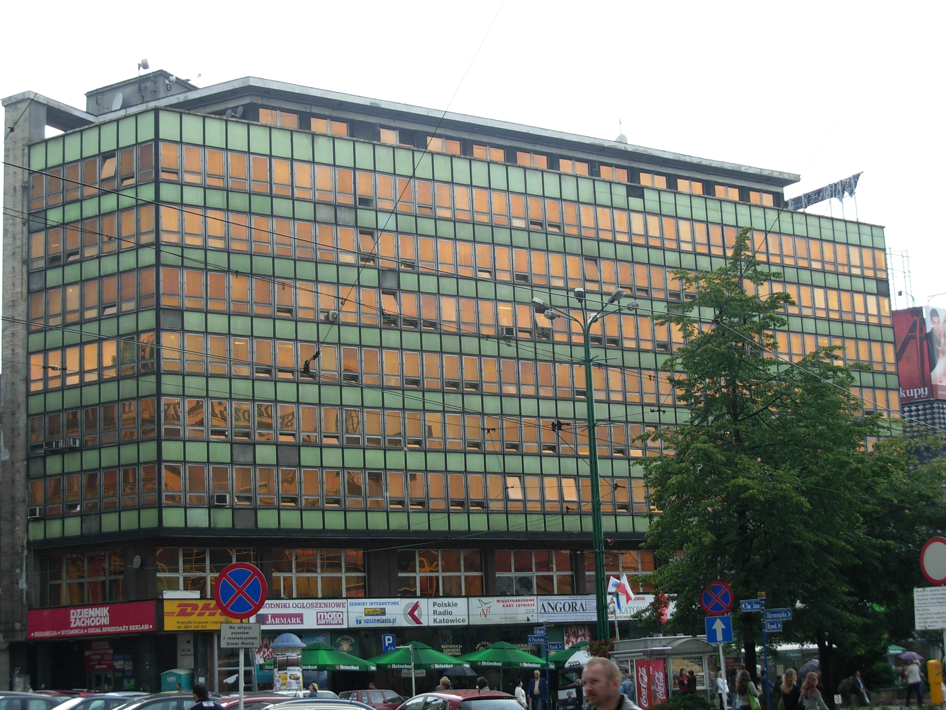 Katowice